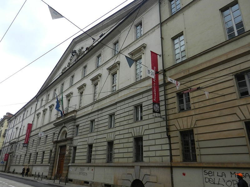 Torino - Accademia Albertina